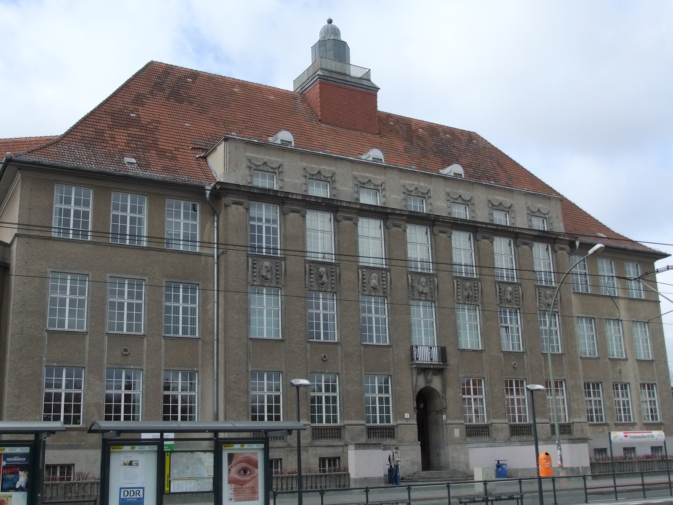 Denkmalliste Berlin OBJ-Dok-Nr.: 09040043 – Berlin Karlshorst Lyzeum Karlshorst, 1913-14, Erweiterungsbauten, 1919-20, Umbau, 1950 von Hanns Hopp (Gesamtanlage, Bestandteil des Ensembles Treskowallee 8/12, Fachhochschule für Technik und Wirtschaft, Denkmalliste Berlin 09040065)